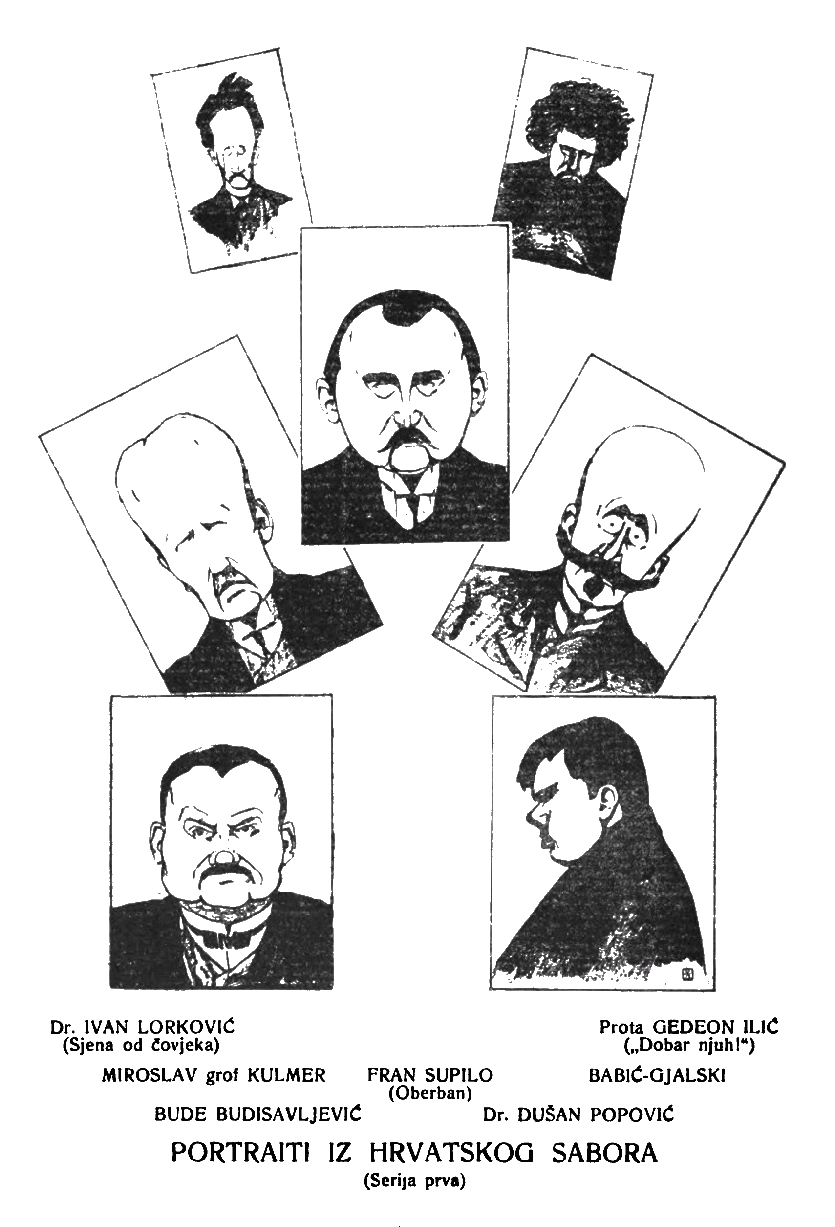 Dr. Ivan Lorković (Sjena od čovjeka); Prota Gedeon Ilić ("Dobar njuh!"); Miroslav grof Kulmer; Fran Supilo (Oberban); Babić-Gjalski; Bude Budisavljević; Dr. Dušan Popović